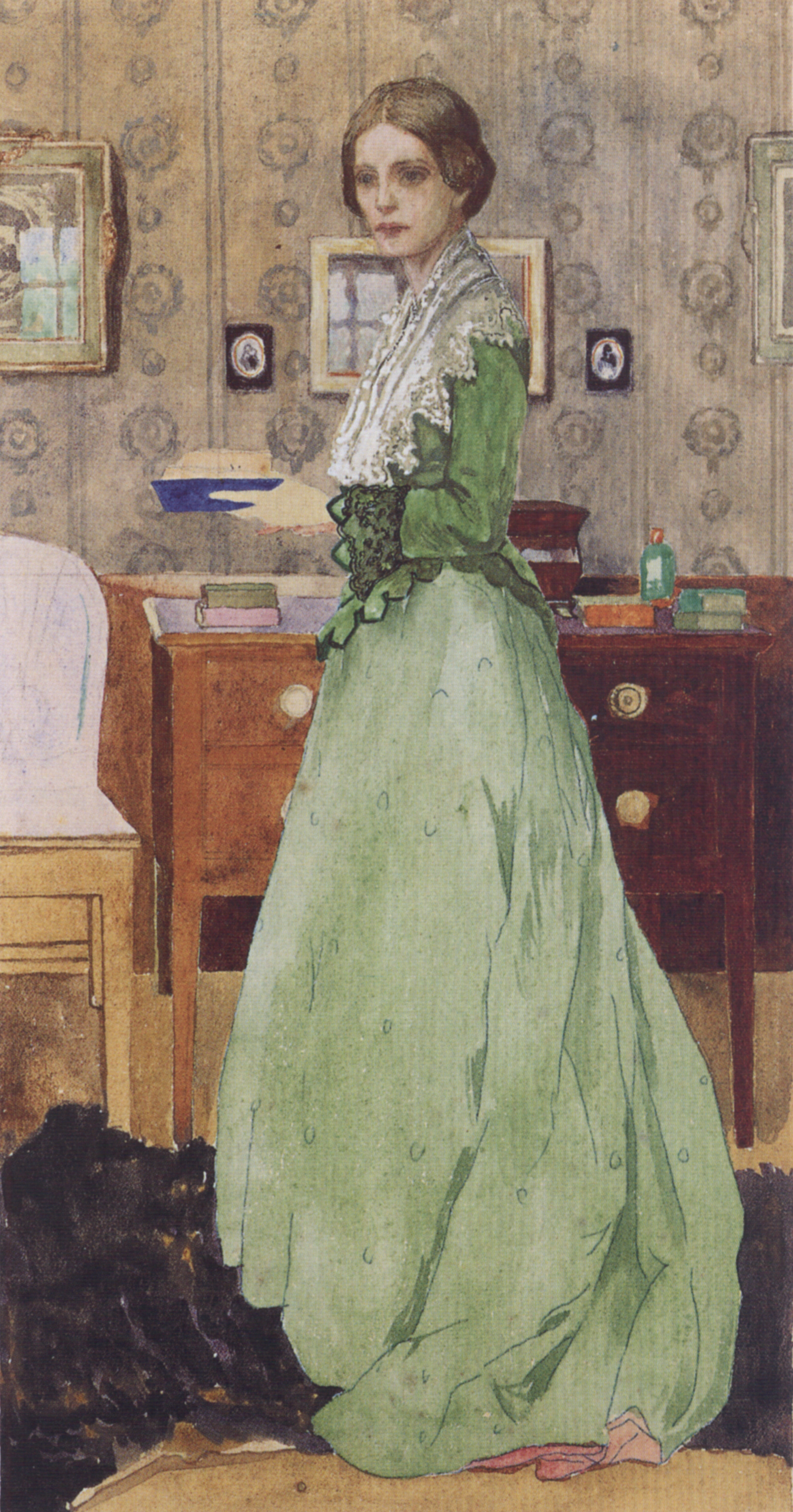 Haus im Schluh, Worpswede